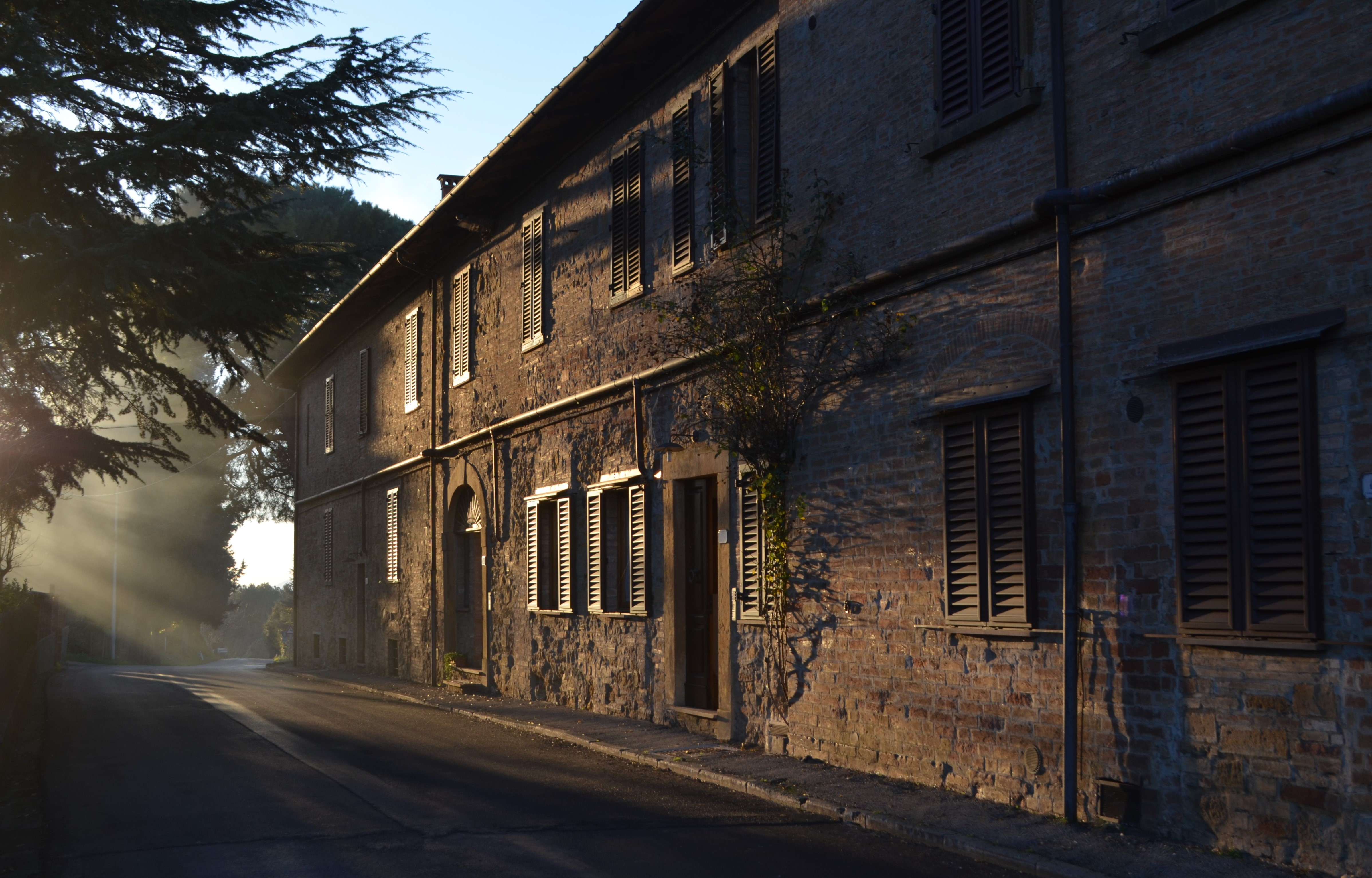 Il centro abitato di San Vivaldo, Montaione, Firenze